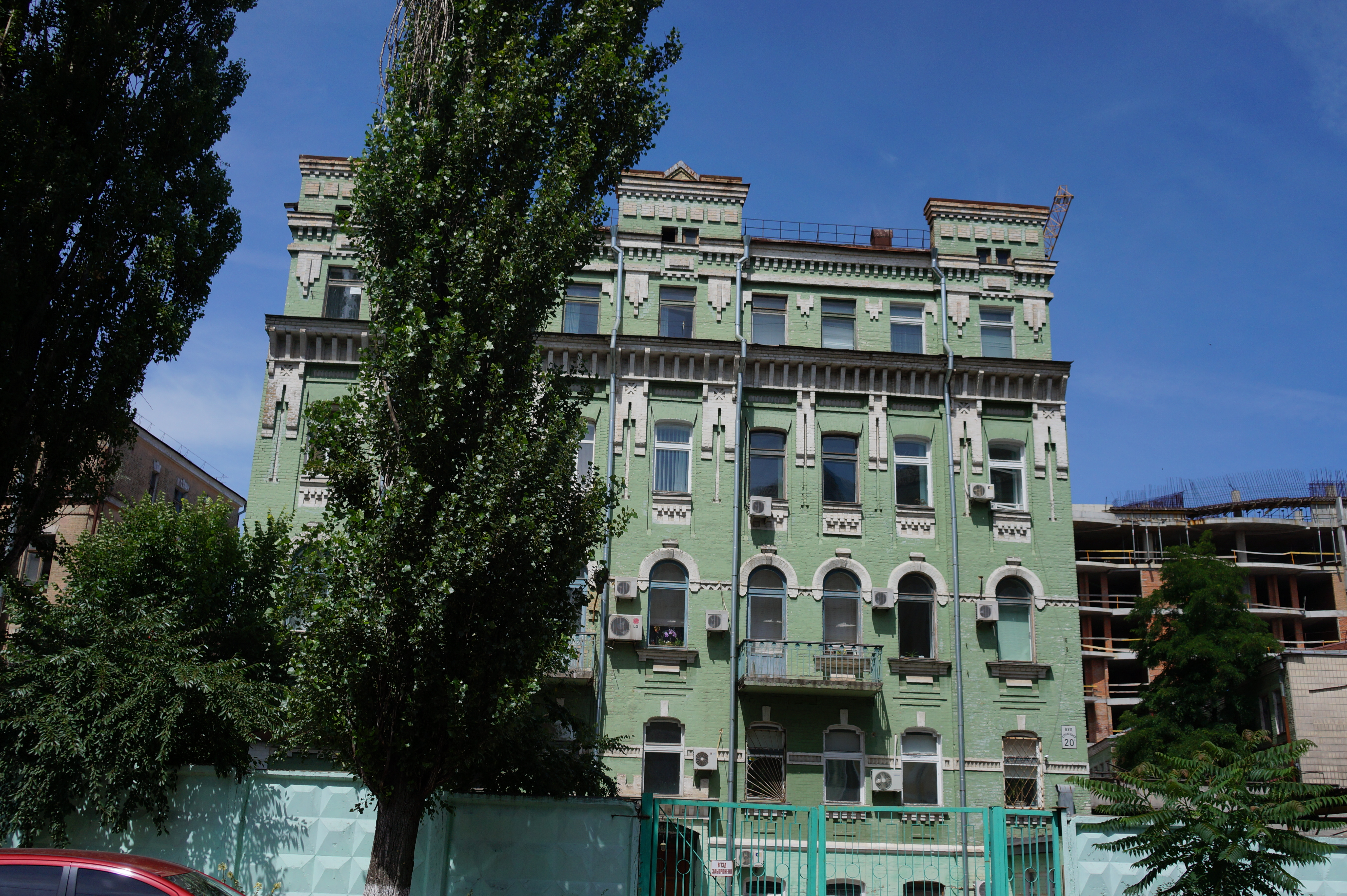 Флігель (№ 2), Київ, Рейтарська вул., 22